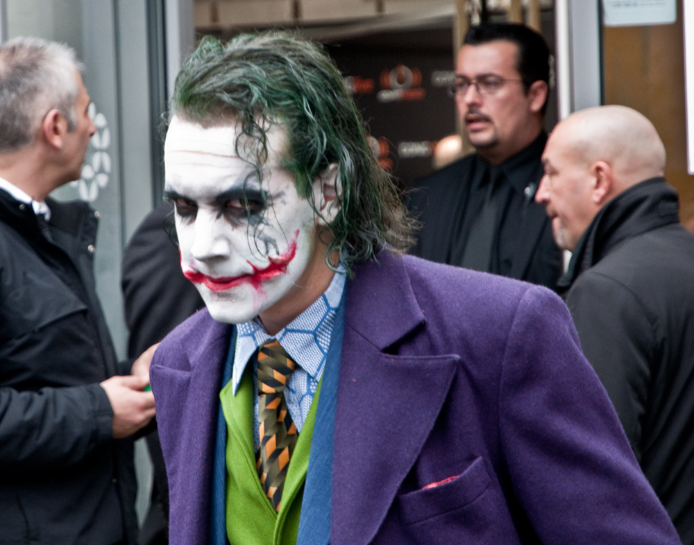 Paris Manga 9, February 2010, Parc des expositions de la porte de Versailles.